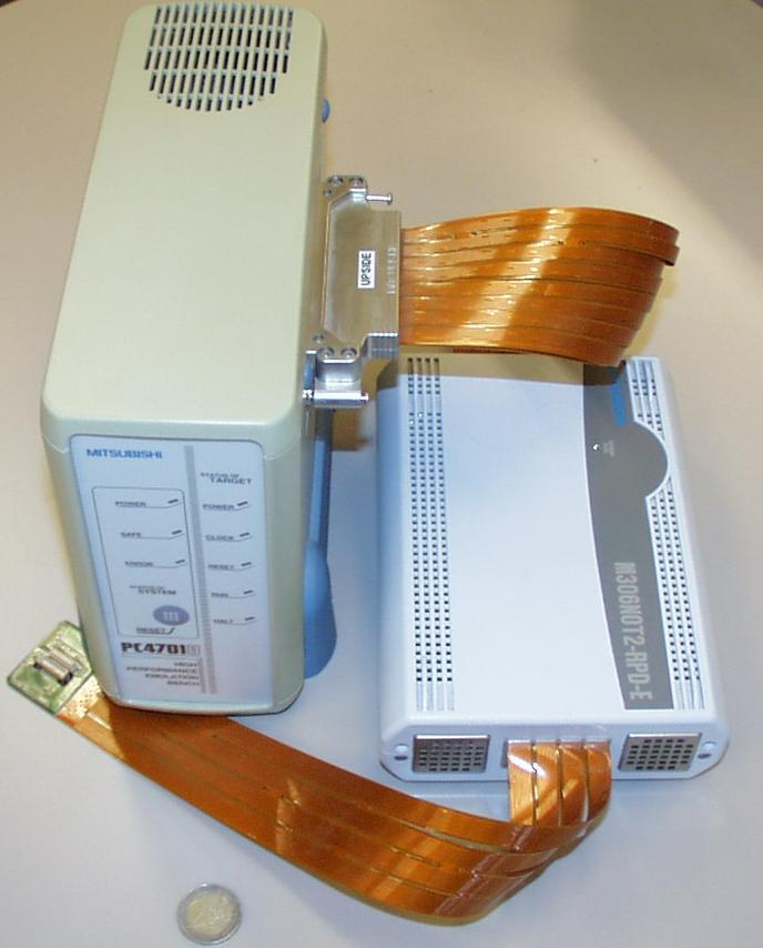 In Circuit Emulator fuer M16C-Microcontroller